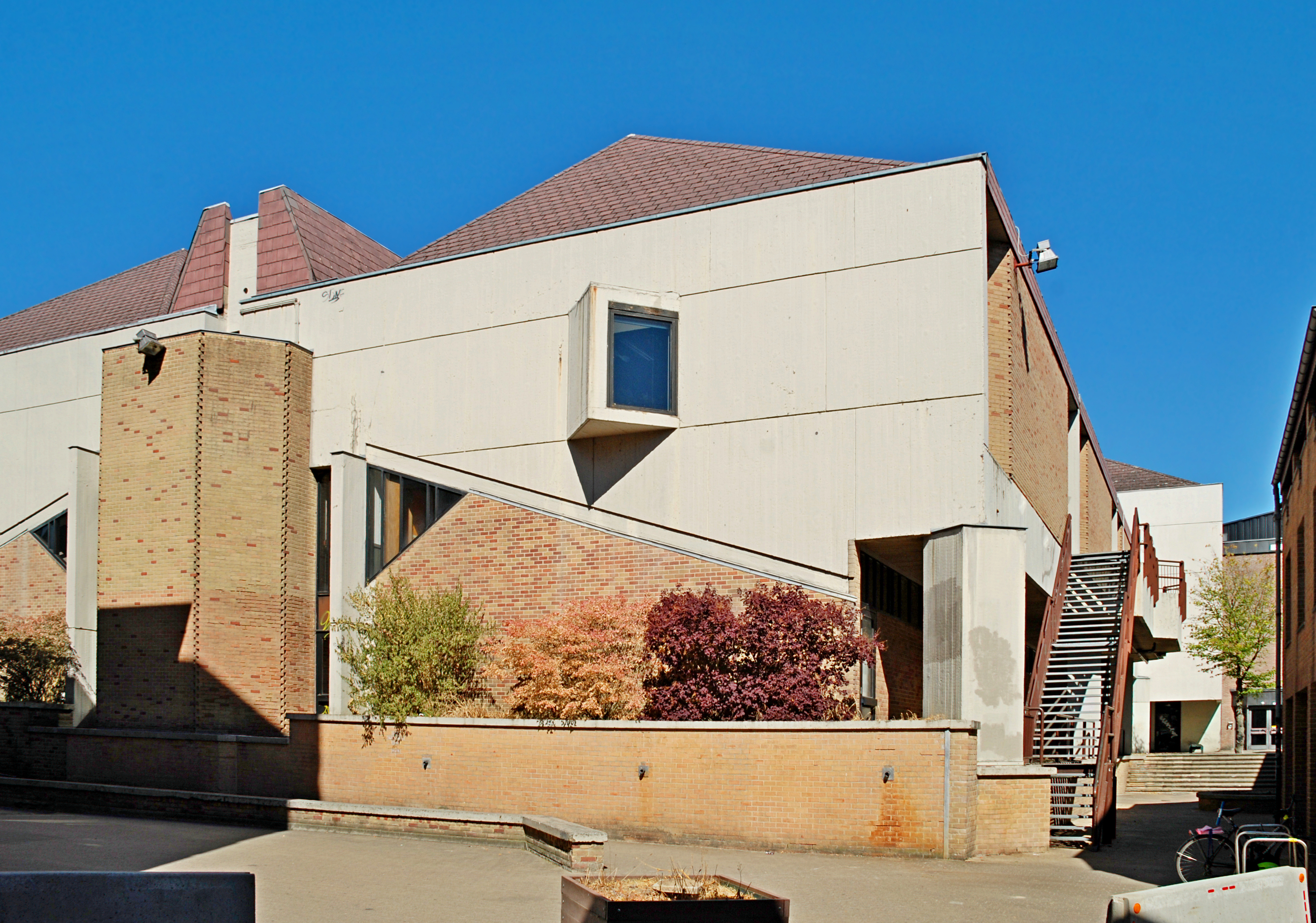 Belgique - Louvain-la-Neuve - Grand-Place - Auditoires Agora - façade occidentale This photo of immovable heritage has been taken in the Walloon Region